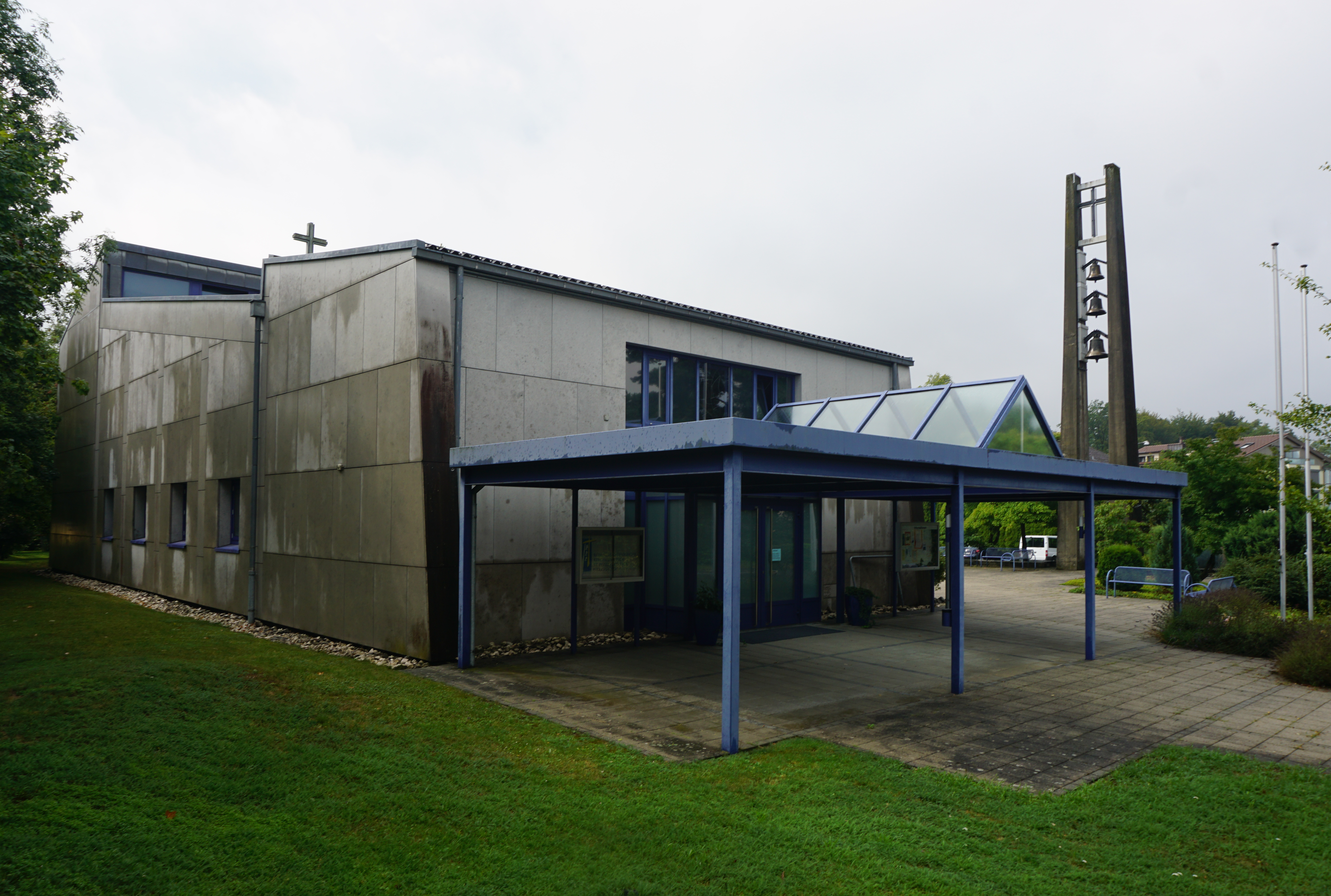 Kath. Kirche Utzenstorf, Eingang